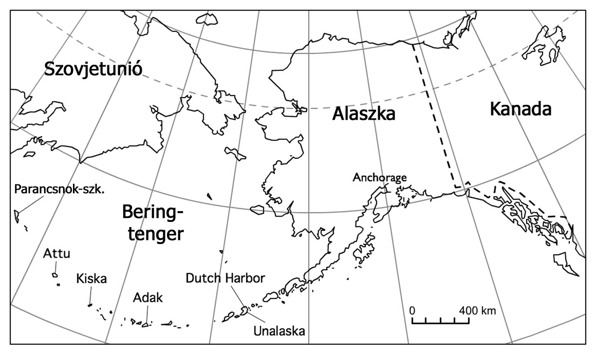 Térkép az Aleut-szigeteki csatához